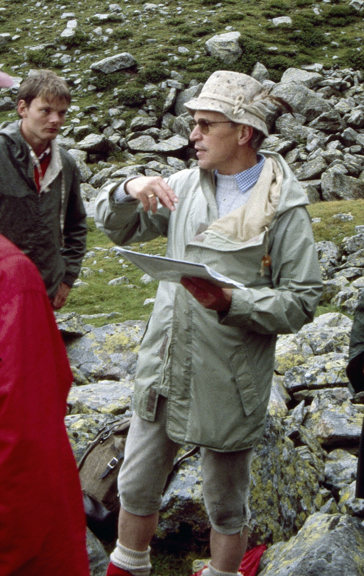 Prof. Dr. Hansgeorg Förster bei einem Kartierkurs in der Schobergruppe (Aufnahme von 1988)